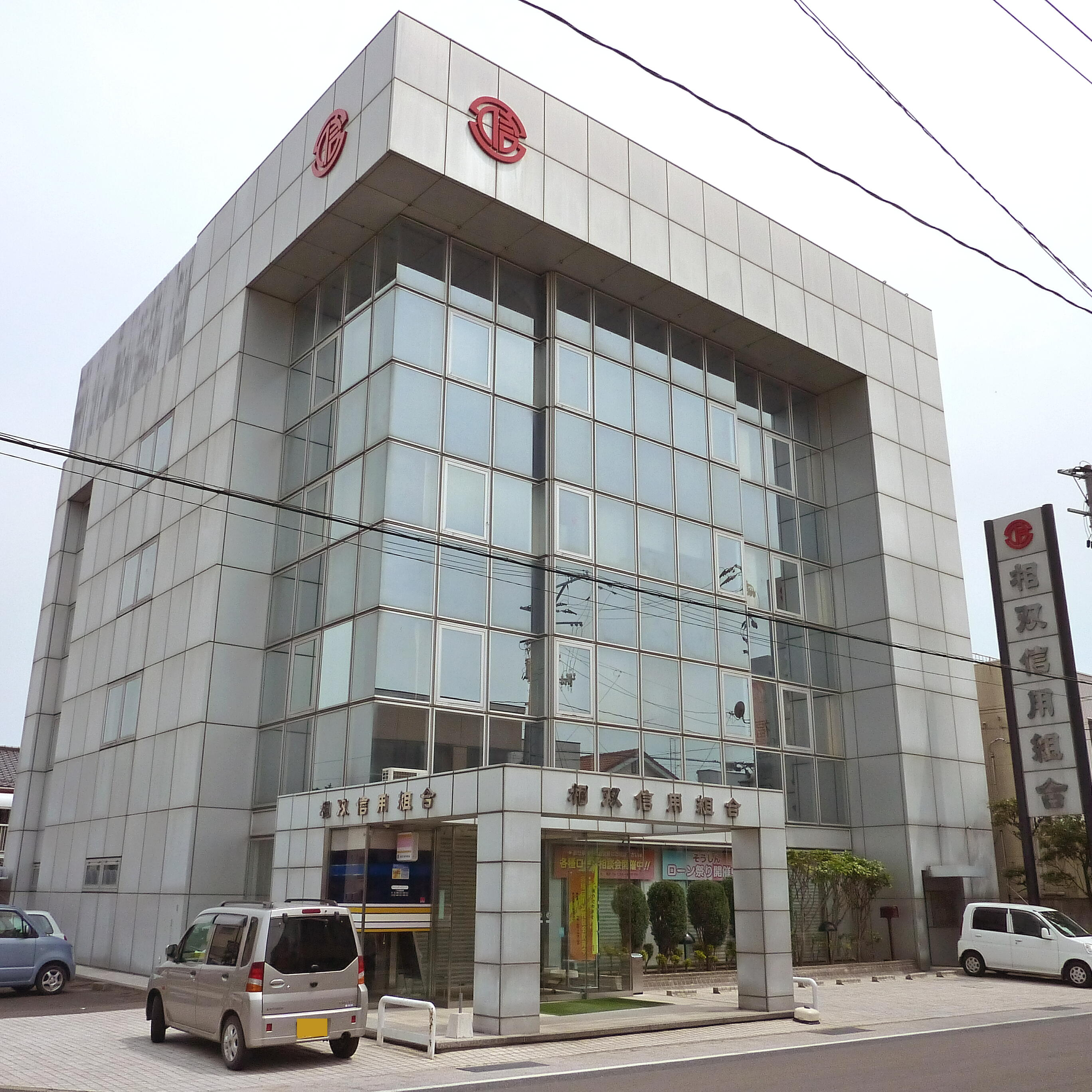 相双信用組合本店